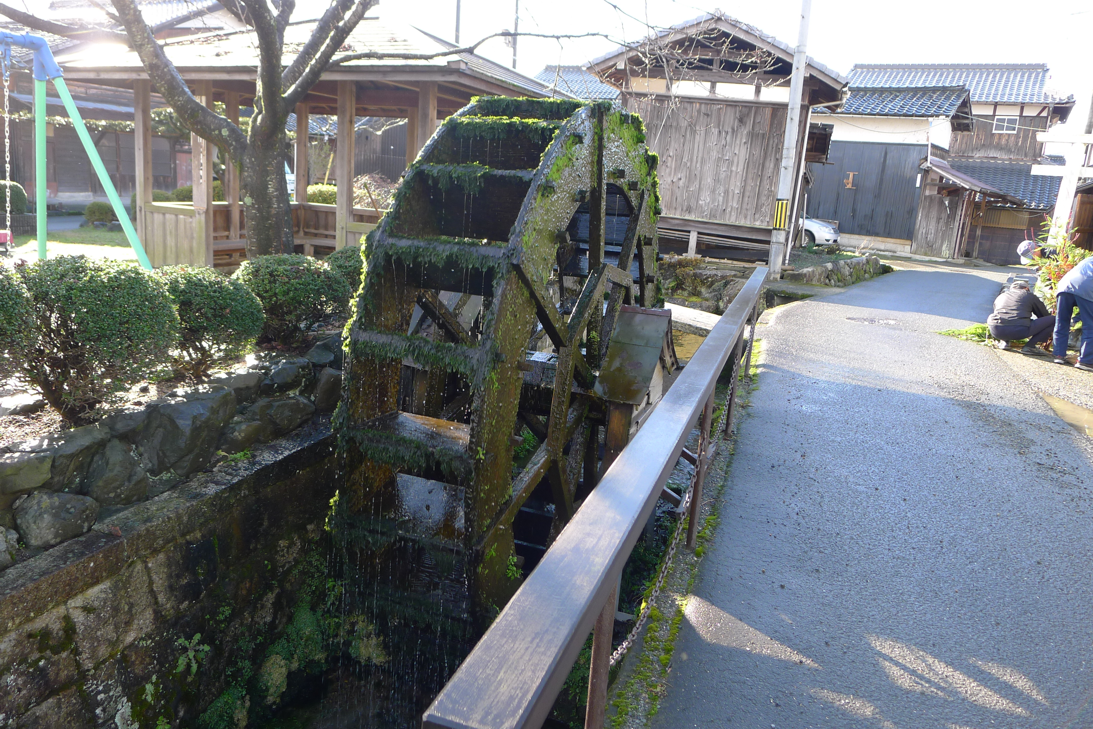 「高島市針江・霜降の水辺景観」：針江地区の水車